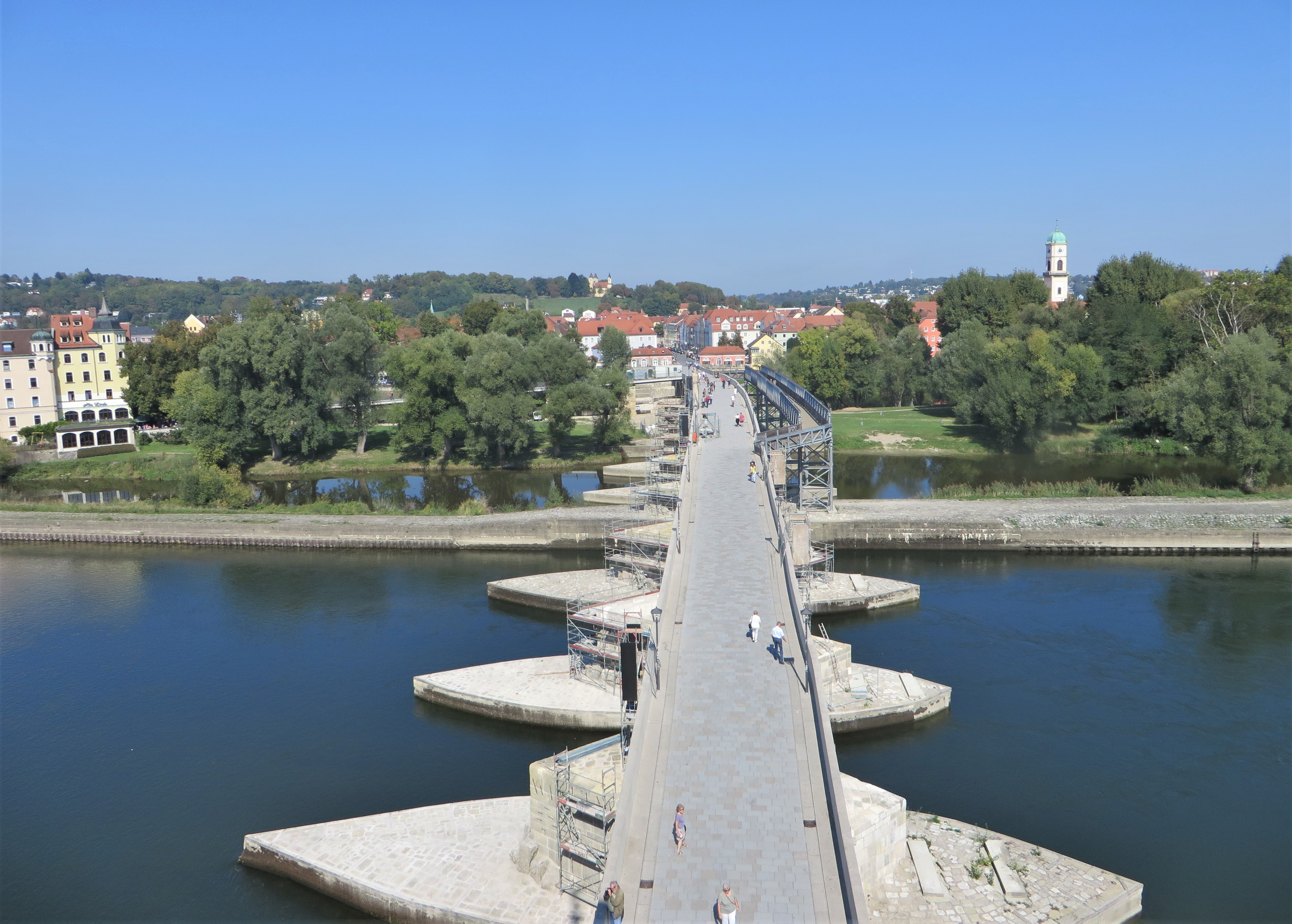 Blick vom Brückturm auf die Steinerne Brücke über die Donau in Regensburg kurz vor Ende der Sanierung . Im Hintergrund der Umgehungssteg der Baustelle und der Ortsteil Stadtamhof.